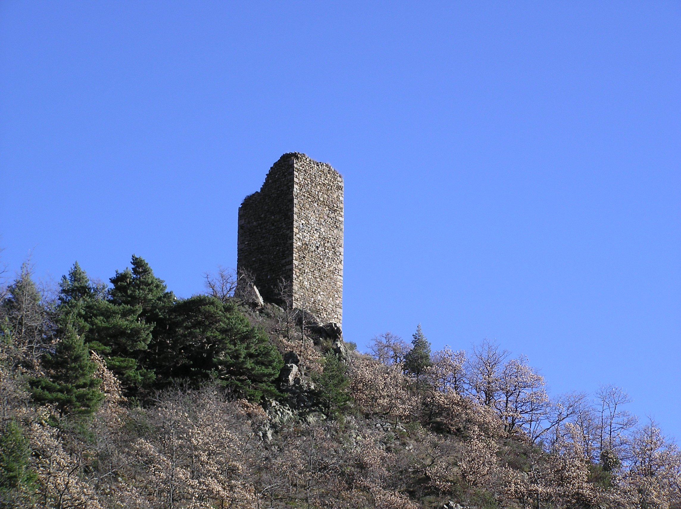 Tour de Mascarda, tour de guet situé entre le village de Mosset et le col de Jau.